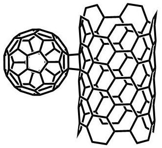 fig 12